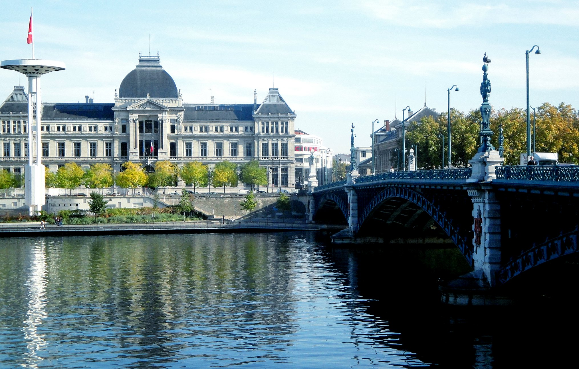 Un premier plan de l'Université Jean Moulin, Lyon III et à droite le Pont de l'Université, Lyon